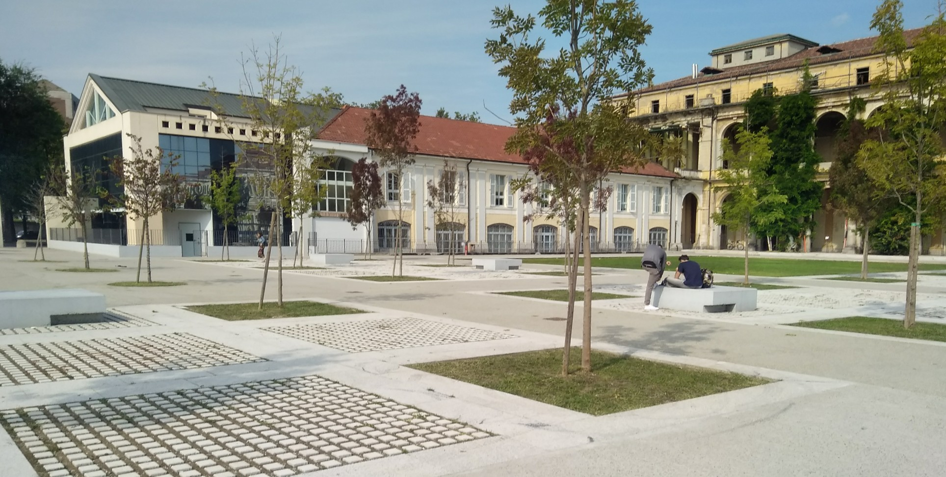 Università degli studi del Piemonte orientale Sede di Vercelli